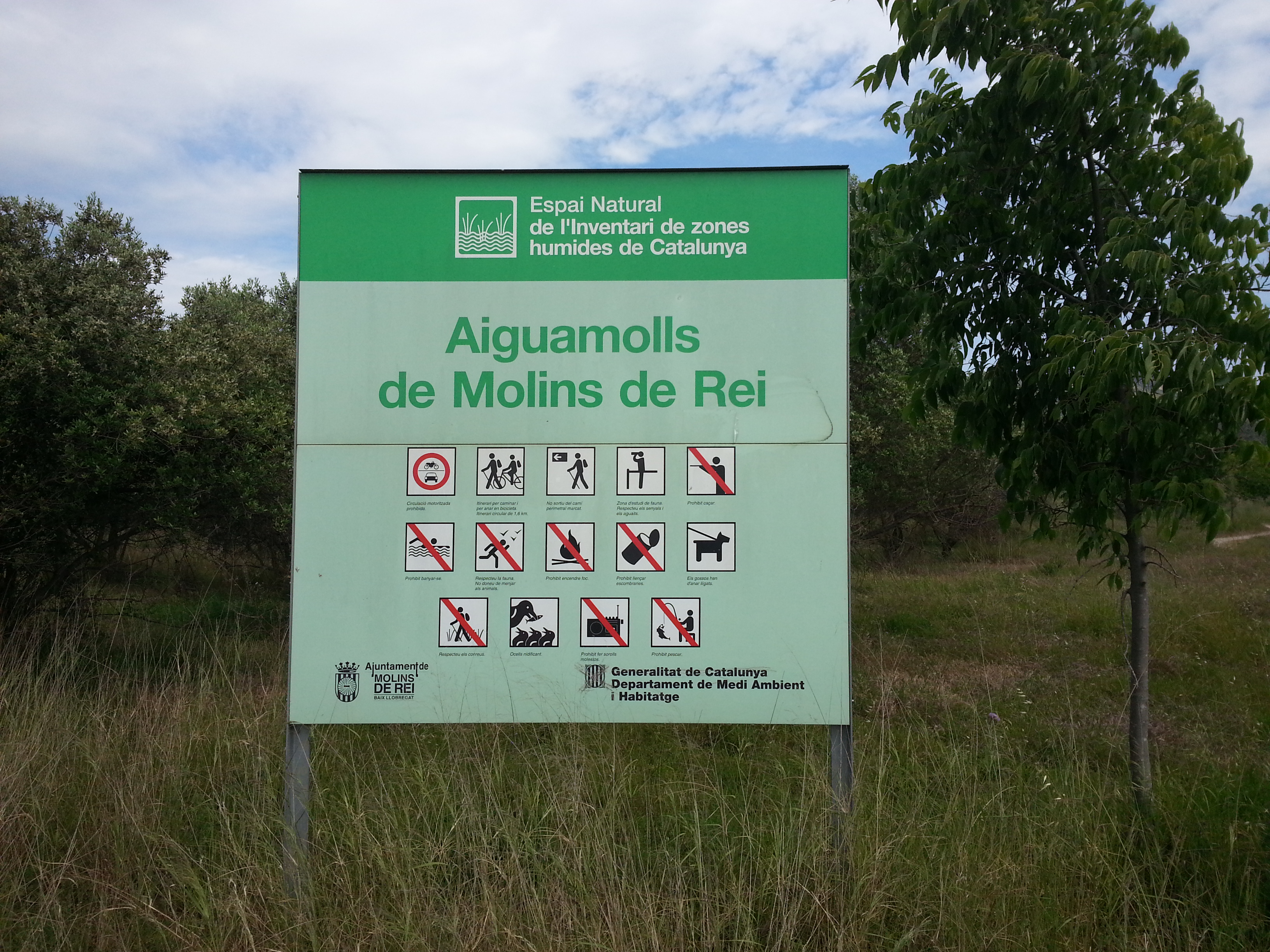 Aiguamolls de Molins de Rei This is a a photo of a wetland in Catalonia, Spain, with id: IZHC-08001109